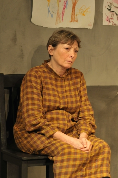 Bodnár Erika magyar színésznő.